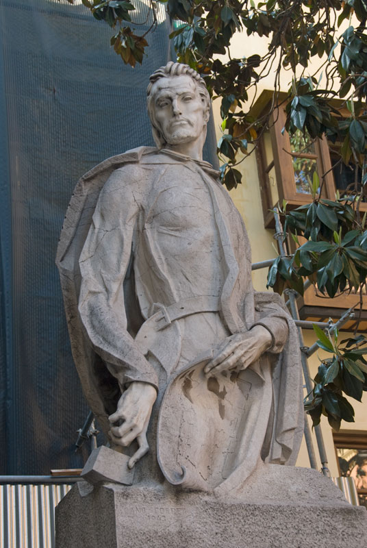 Monumento a Alonso Cano realizado por Antonio Cano en Granada en el año 1943, estando instalado en la plaza del Palacio Arzobispal, junto a la Catedral de Granada y debajo de un Magnolio.